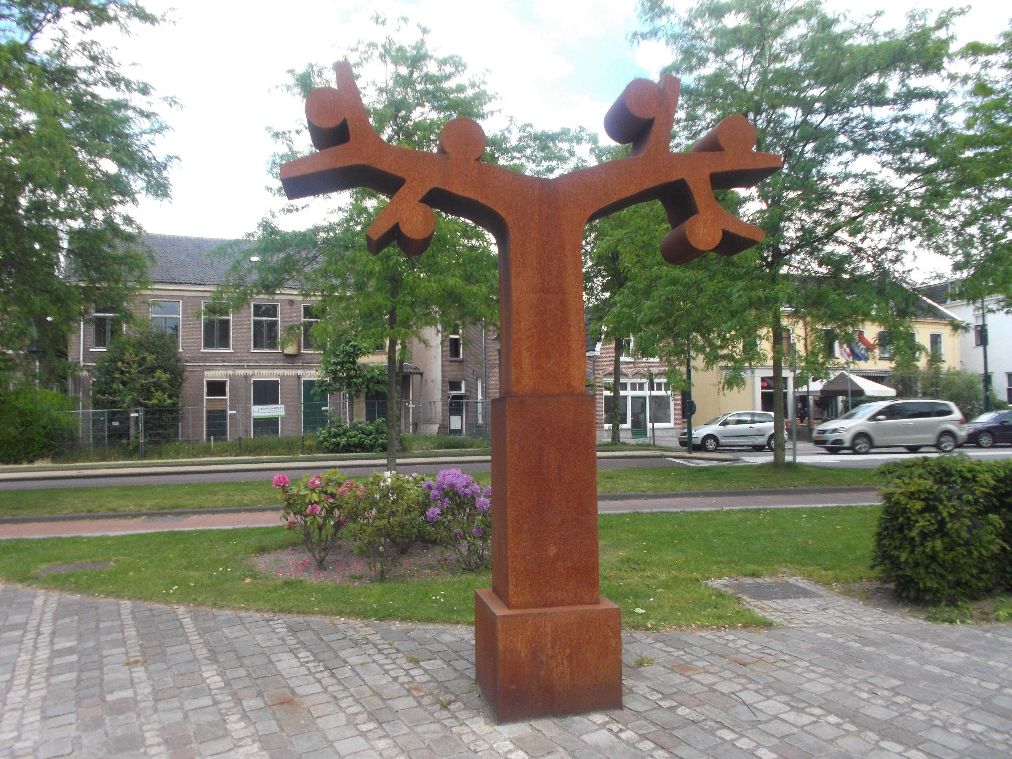 Spring (lente), cortenstaal. Piet Warffemius. Doorn, Kerkplein.